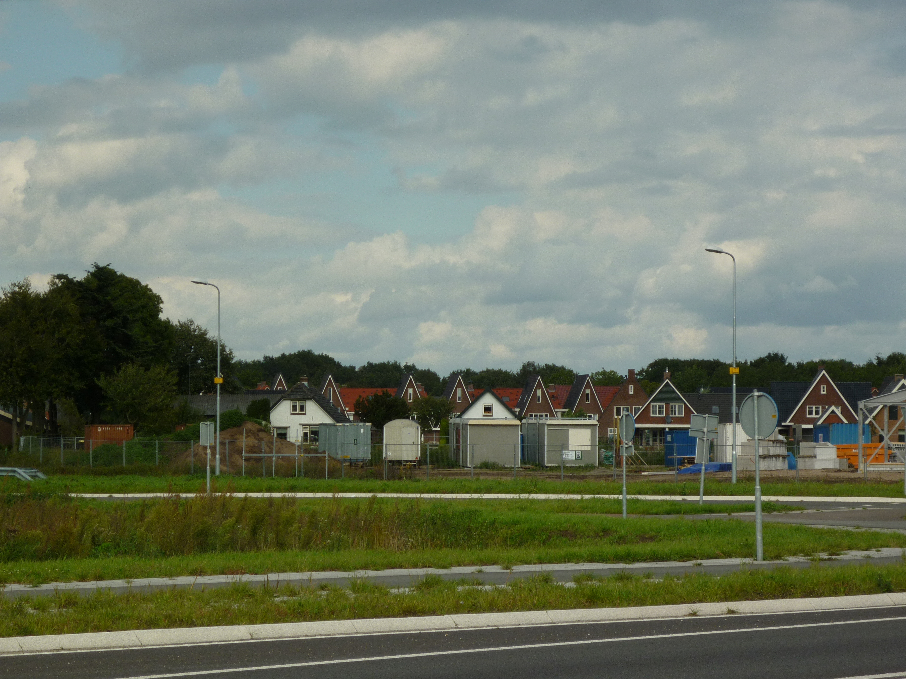 Nieuwbouwwijk Bijsteren bij Putten, Gelderland